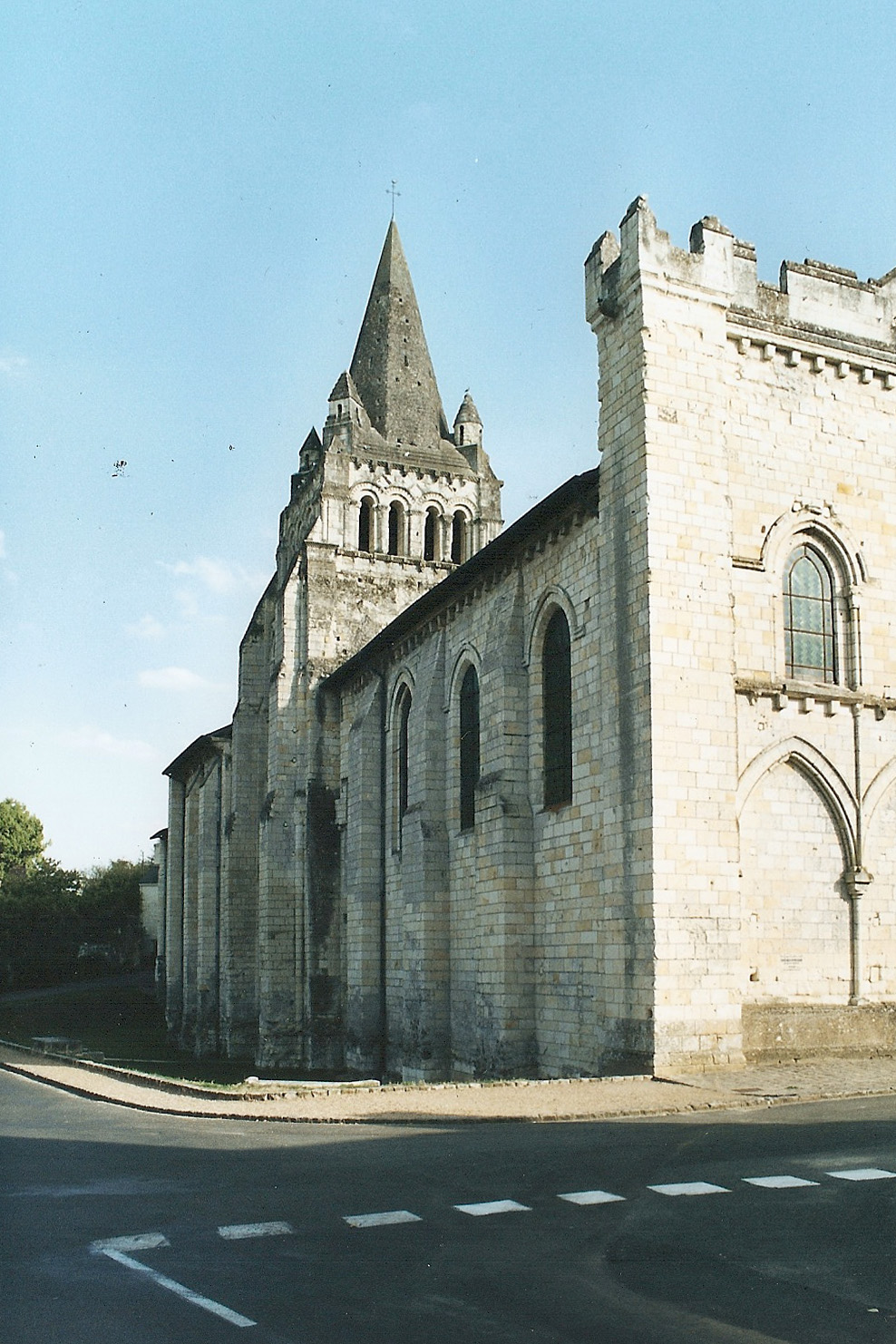 N.-D. Cunault, Lanhgaus von NW